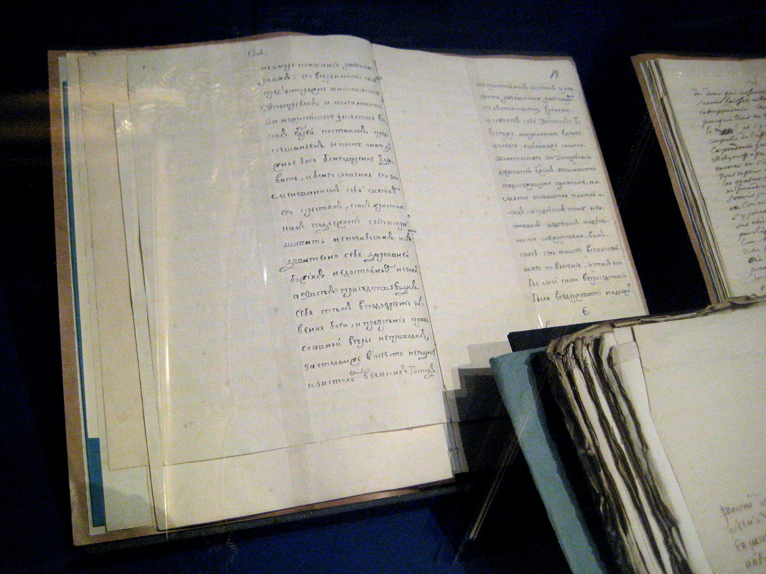 Инструкция Н.Н. Чоглокову о наблюдении за поведением, обучением и манерам Петра Федоровича. 10 мая 1746 года. РГАДА. Составлен А.П. Бестужевым-Рюминым по приказанию императрицы.